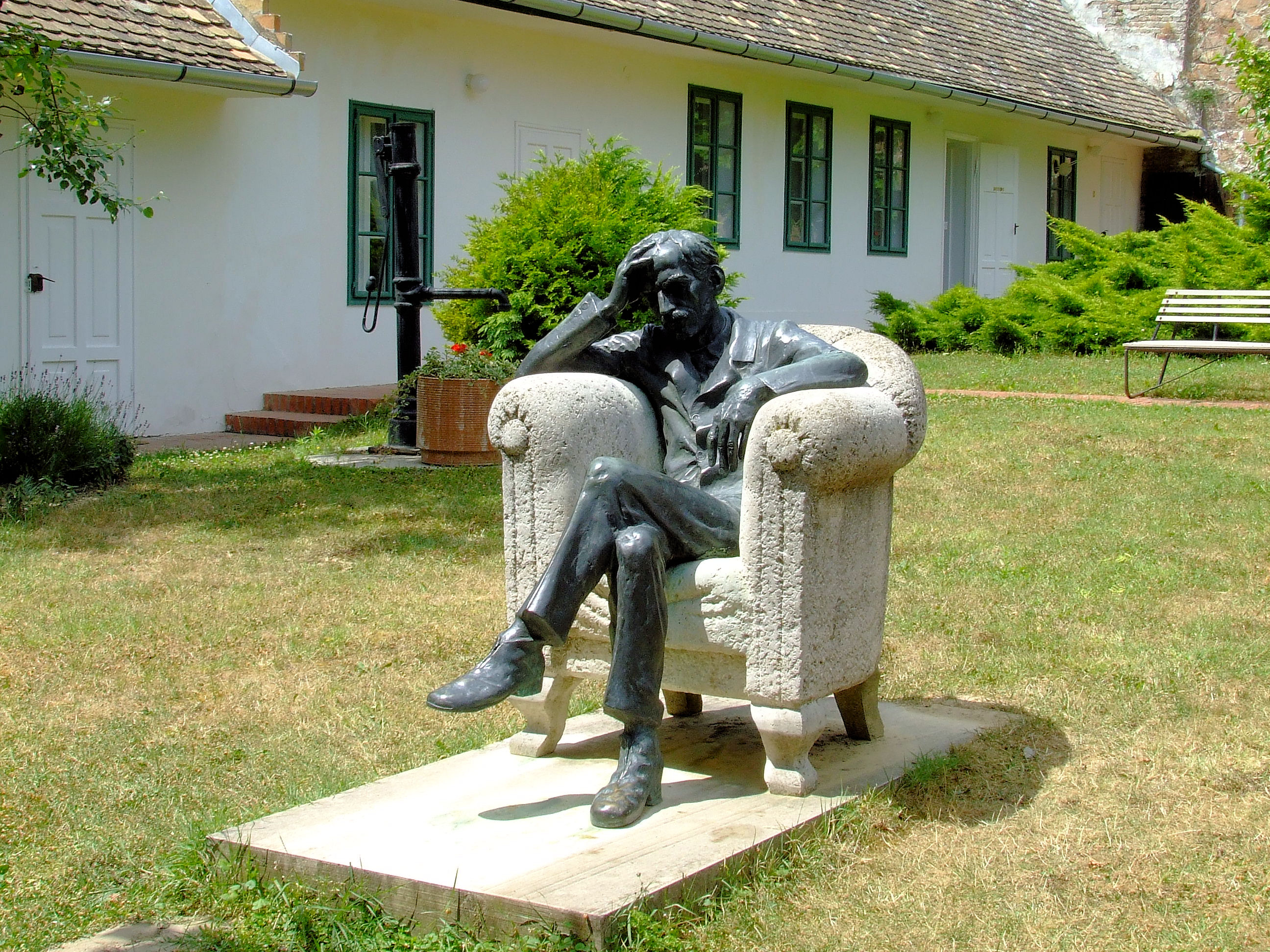 Babits Mihály szobra Szekszárdon. Farkas Pál alkotása (1981)